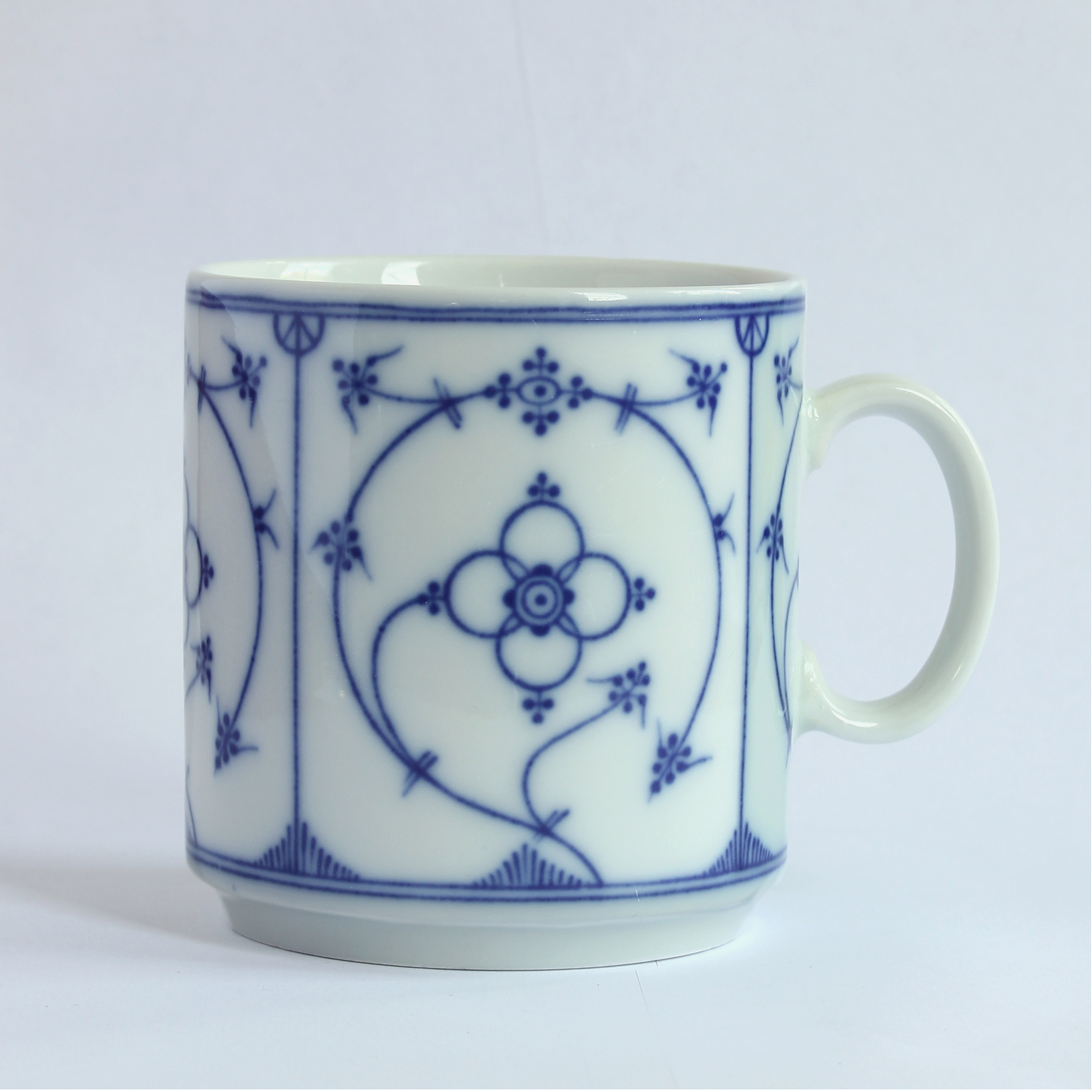 Kaffee- bzw. Henkelbecher, Indisch Blau, um 1980 von Kronester; Höhe 8,5 cm, Durchmesser 8 cm jeweils außen, Inhalt bis 1 cm unterhalb Rand ca. 0,3 Liter